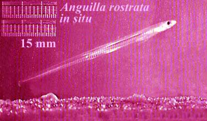 larven amerikanischer aal leo microscope - Photo: Uwe Kils (GNU-FDL)